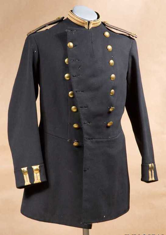 Vapenrock m/1860 för fanjunkare vid Västerbottens regemente Armémuseums inventarienummer: 25745